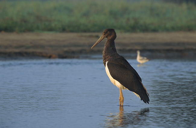 Ciconia nigra, young